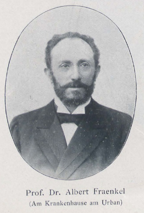 Albert Fraenkel (1848-1916), Mediziner in Berlin, leitender Arzt im Krankenhaus Am Urban in Berlin-Kreuzberg.